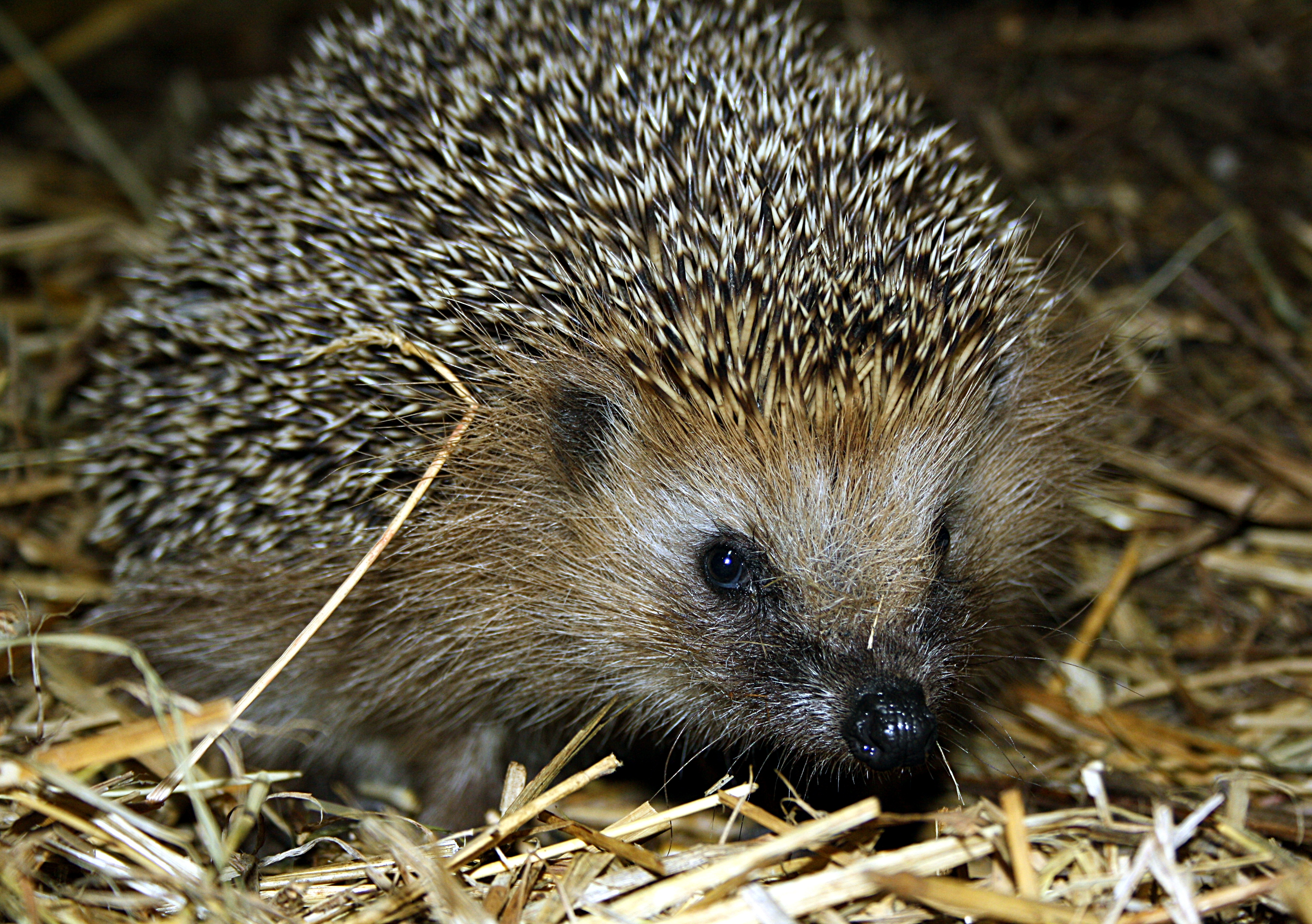 Estonia